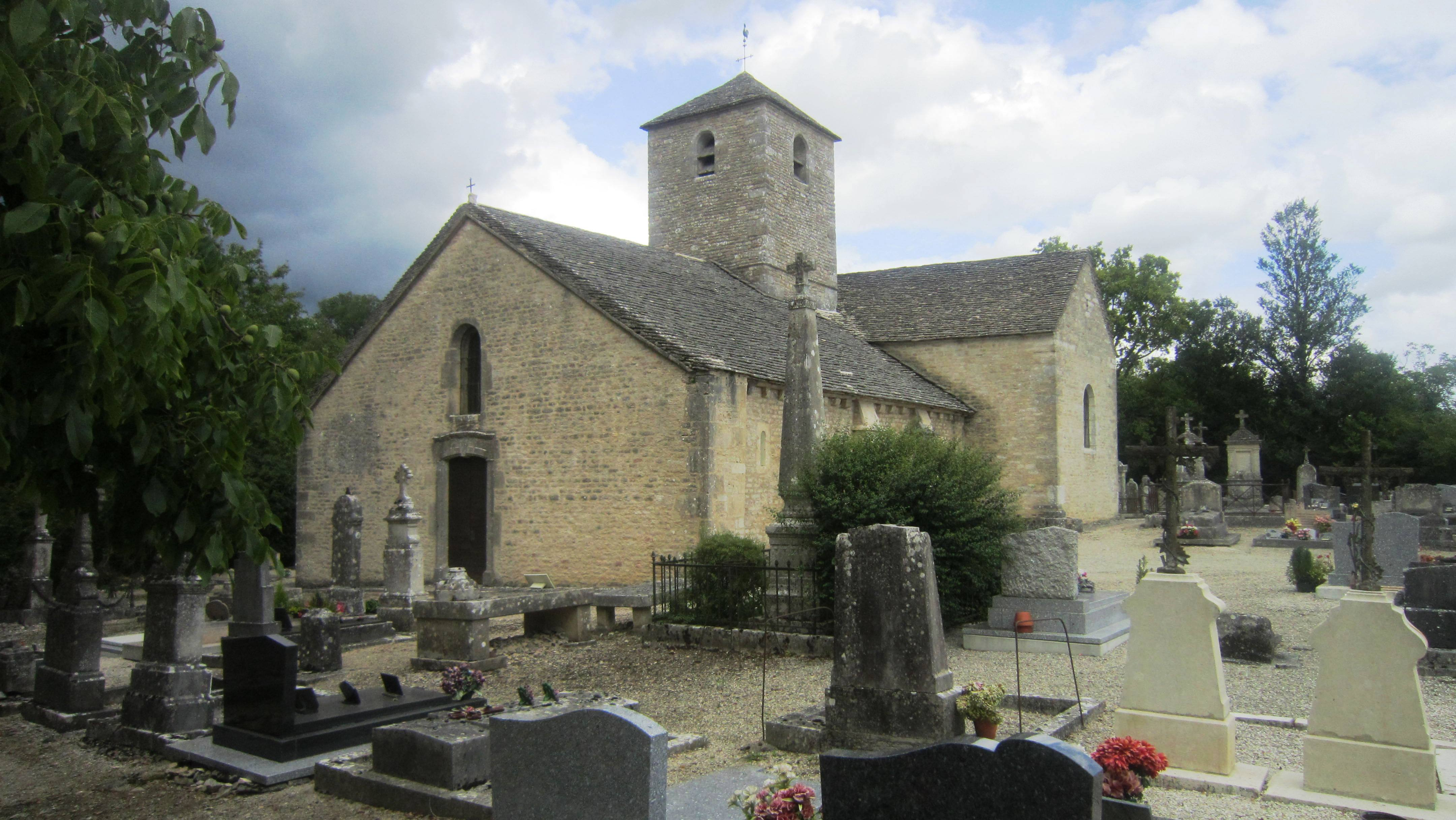 Eglise Saint-Marcel sur le Mont-Lassois (Côte-d'Or)